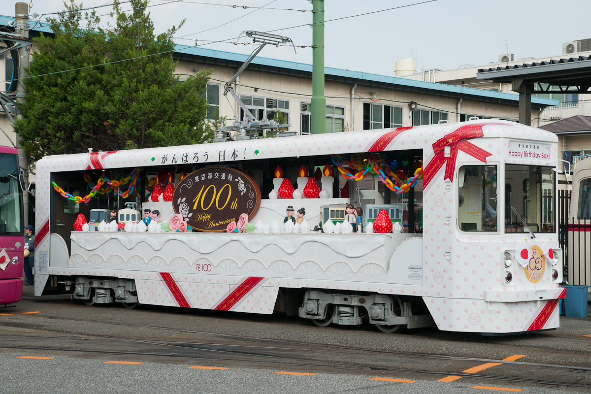 都電荒川線花100形、荒川車庫。